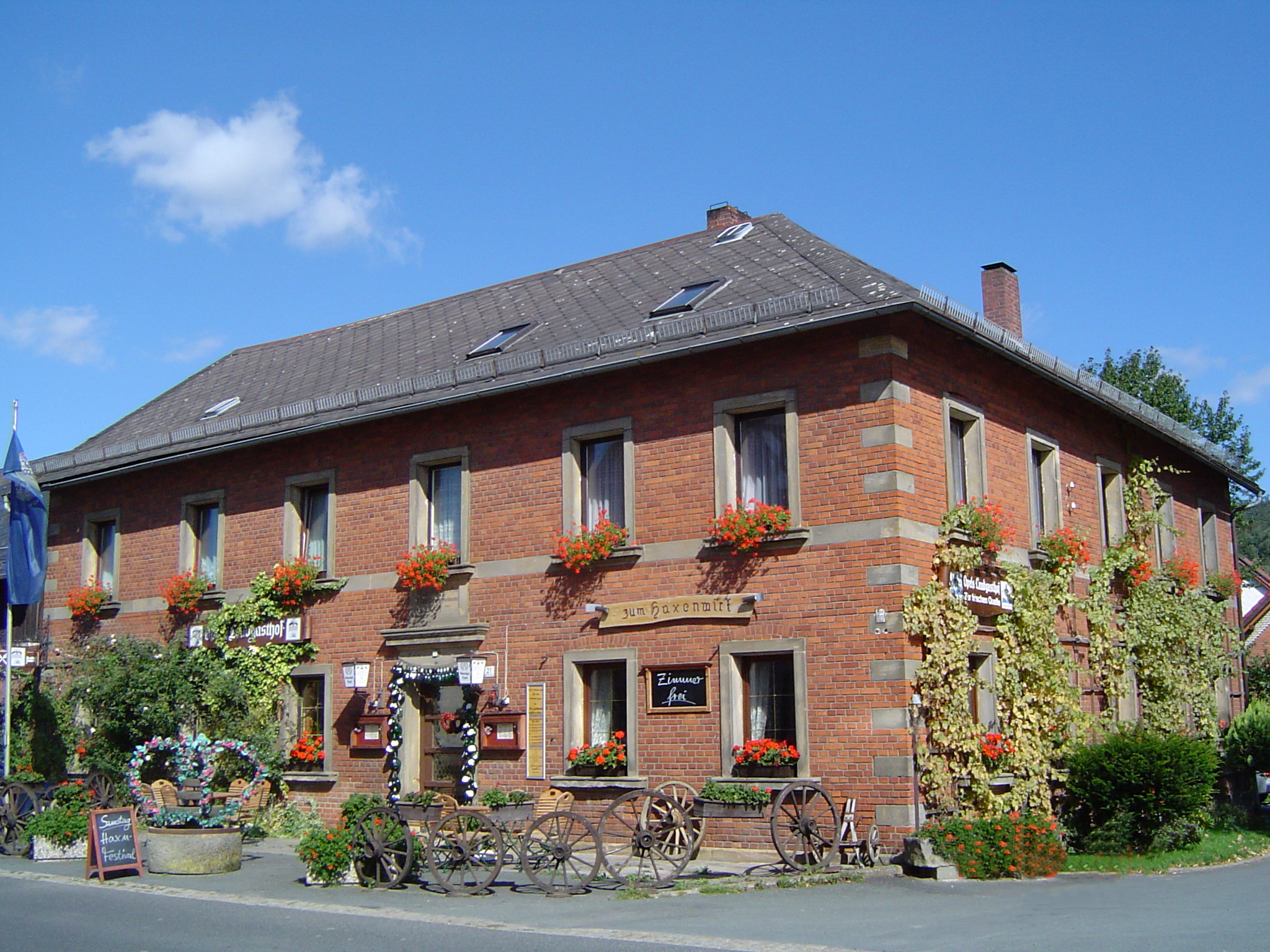 Glashütten, Gasthof, Bayreuther-Strasse-21